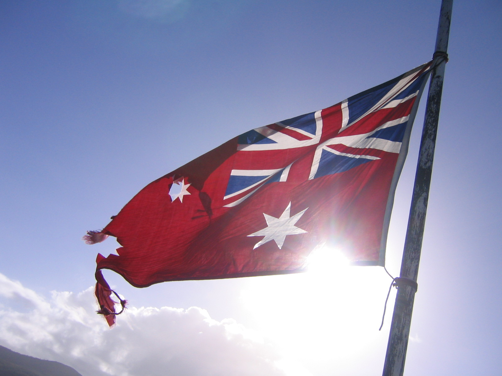 Das Bild zeigt die Australische Handelsflagge, aufgenommen bei einem Segeltripp in den Whitsunday Islands in Australien. Sie ist am linken Rand eingerisse, Verschleisserscheinungen durch den Wind. Aufgenommen gegen die Sonne, mit der Sonne am unteren Rand durchscheinend